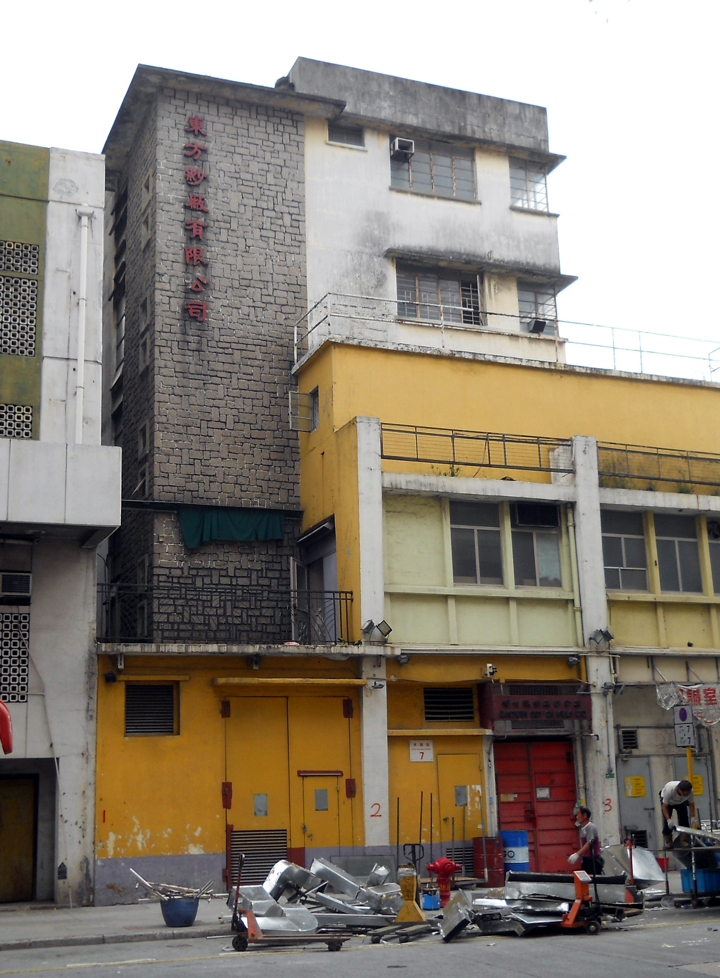 中文（香港）: 東方紗廠